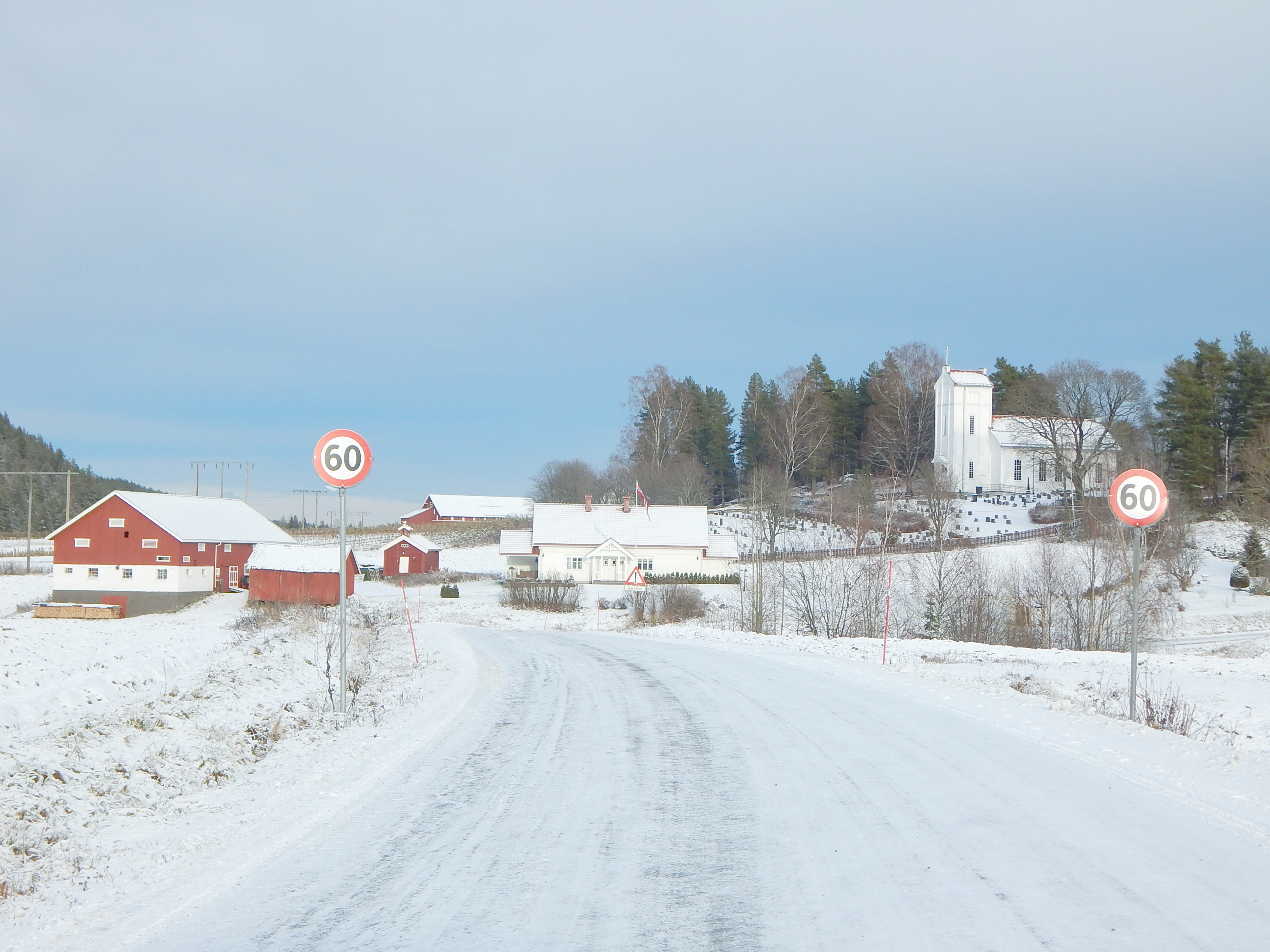 Refsalveien (fylkesvei 149) går forbi Nykirke kirke.